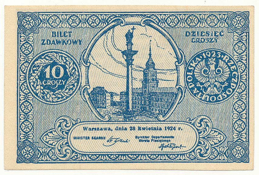 Bilet zdawkowy 10 groszy 1924 awers